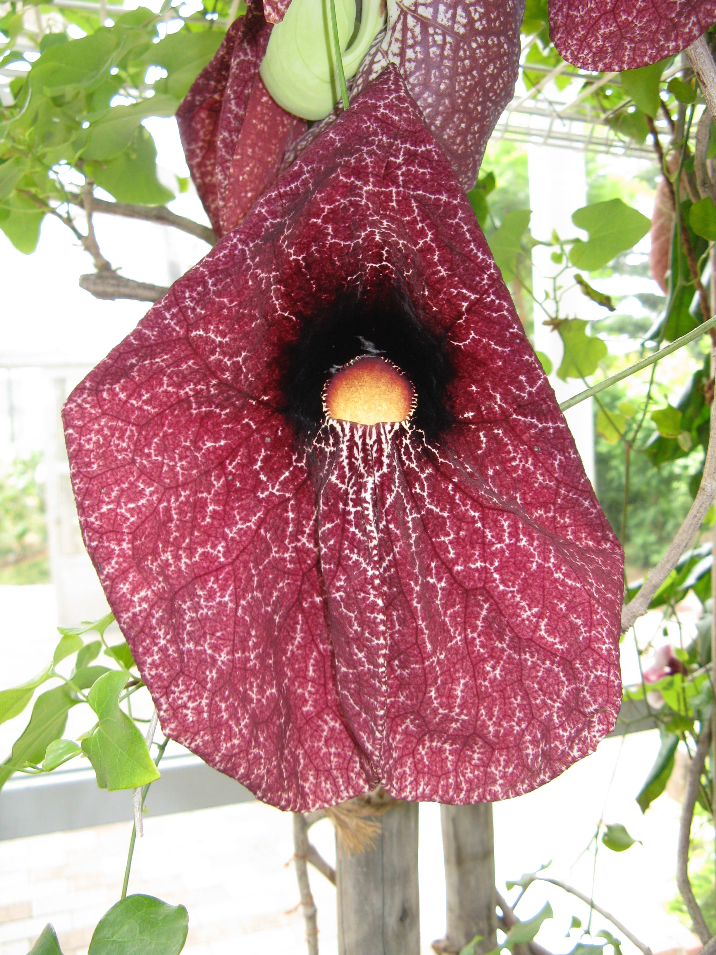 Scientific name Aristolochia gigantea Place:Sakuya Konohana Kan,Osaka,Japan